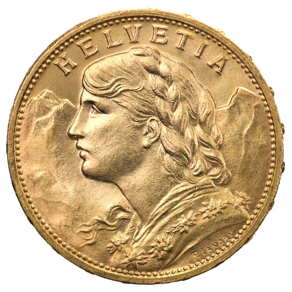 Bildseite der 20 Schweizer Franken Goldmünze "Vreneli".